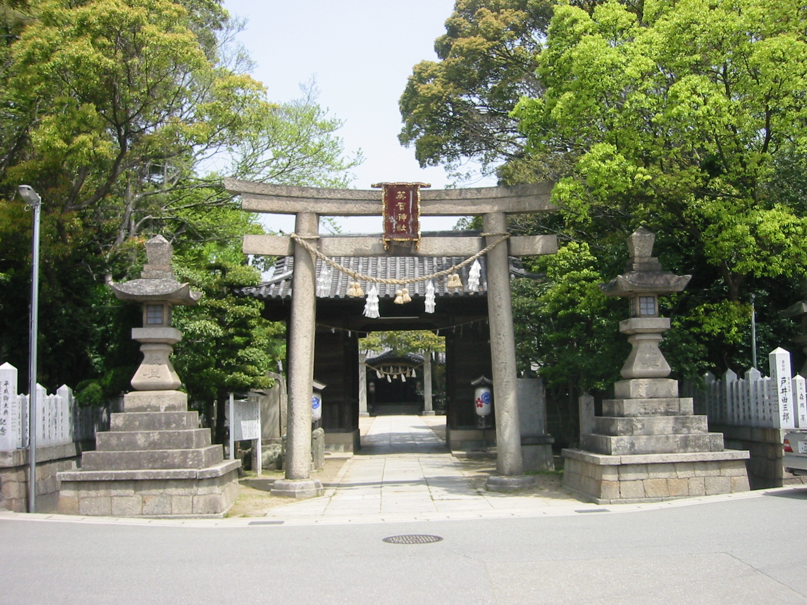 兵庫県英賀英賀神社